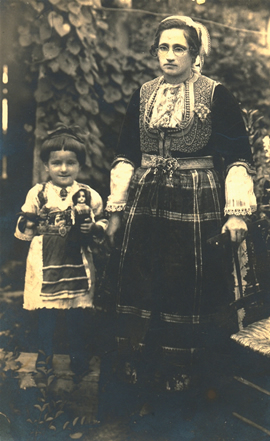 Струшка носија (20-ите години од XX век)